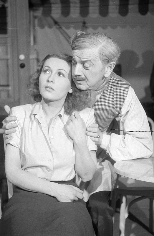 Original image description from the Deutsche FotothekSzenenbilder & Porträt Hans Leibelt in der Rolle des César, Gerty Soltau in der Rolle der Fanny